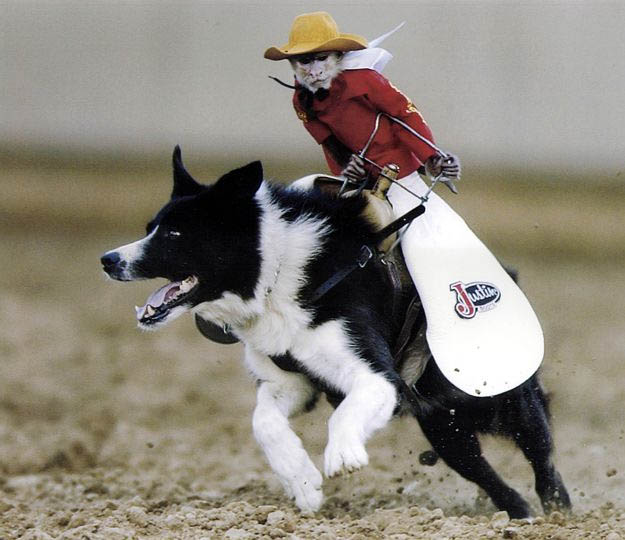 Monkey riding a dog.